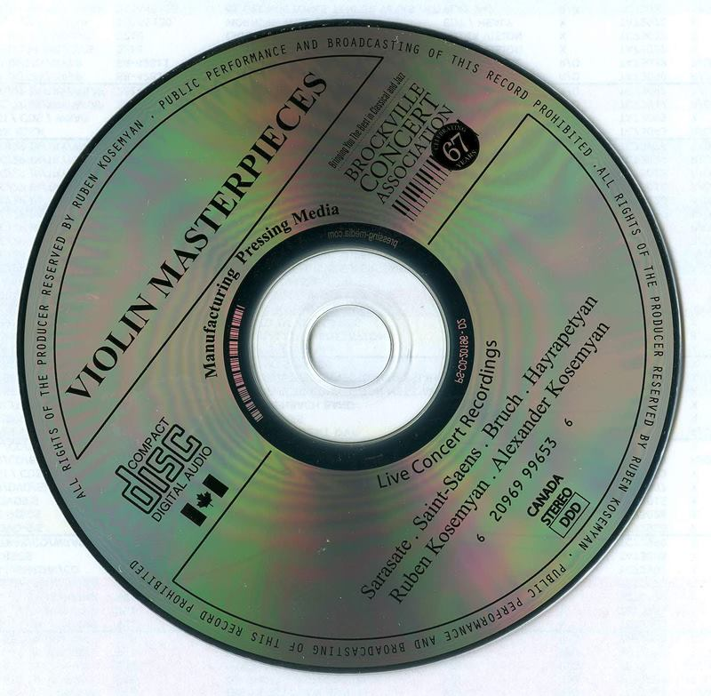 Ռուբեն Կոսեմյանի 2014 թ․ ձայնասկավառակը